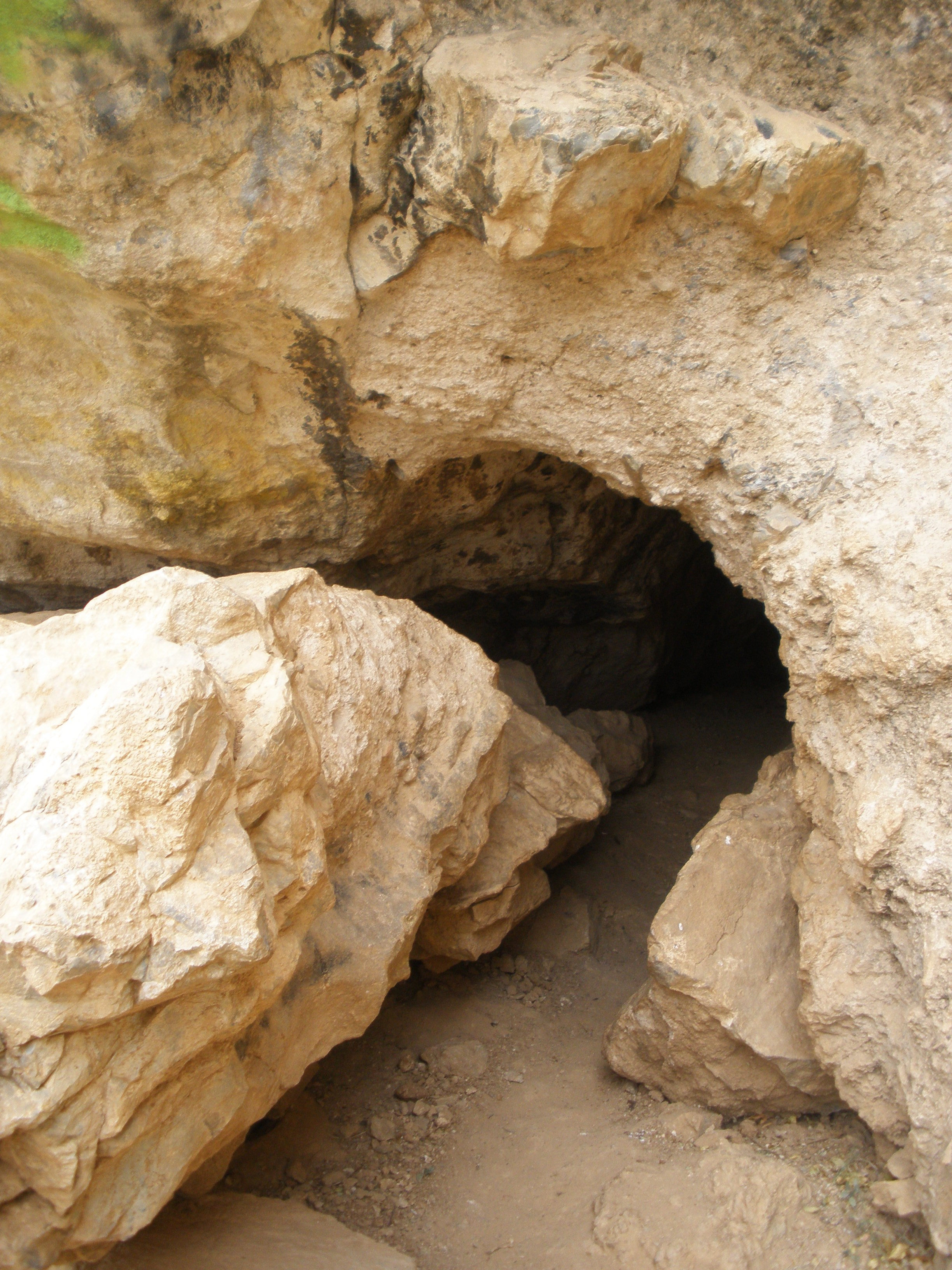 Peppersauce Cave entrance